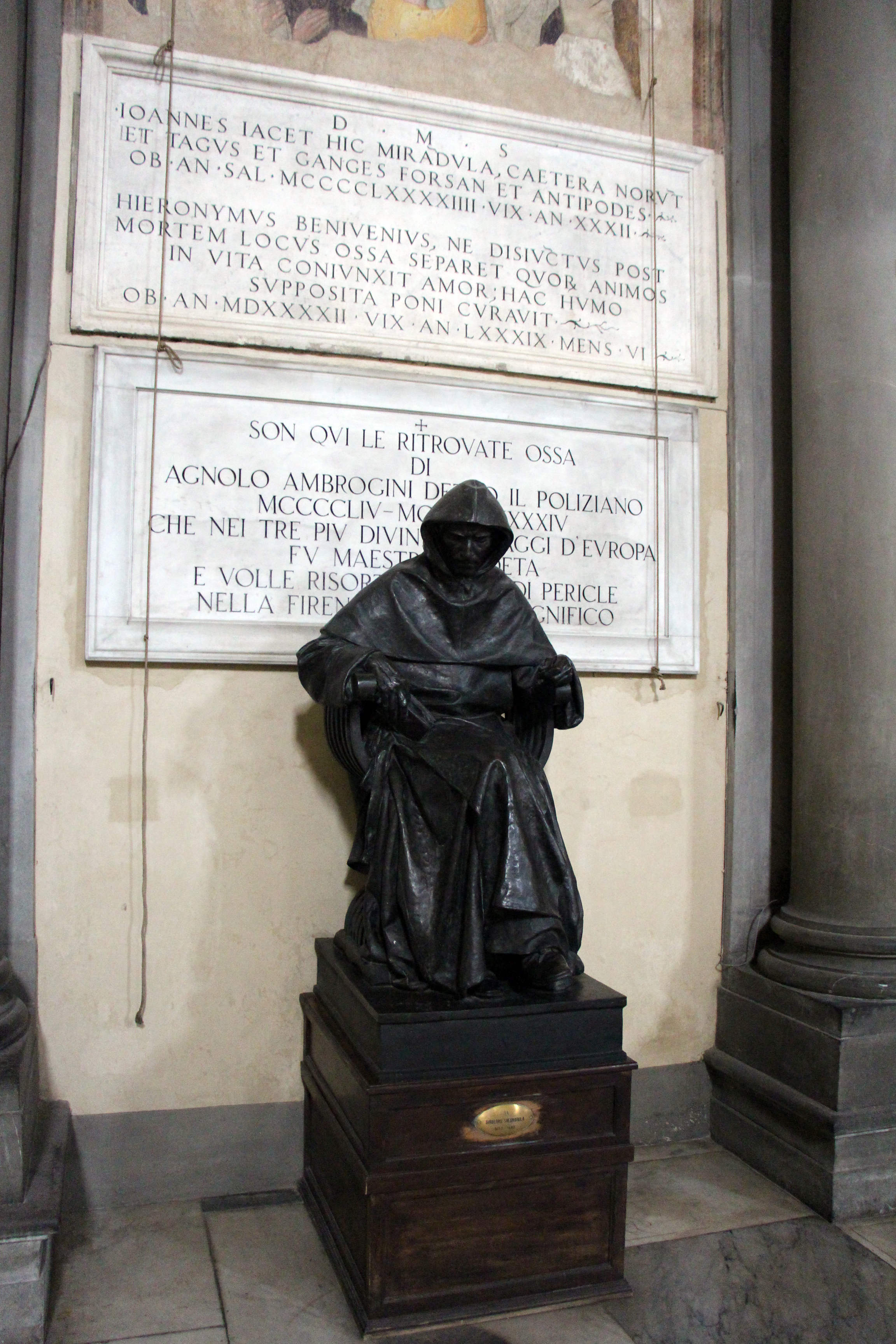 San Marco, Firenze